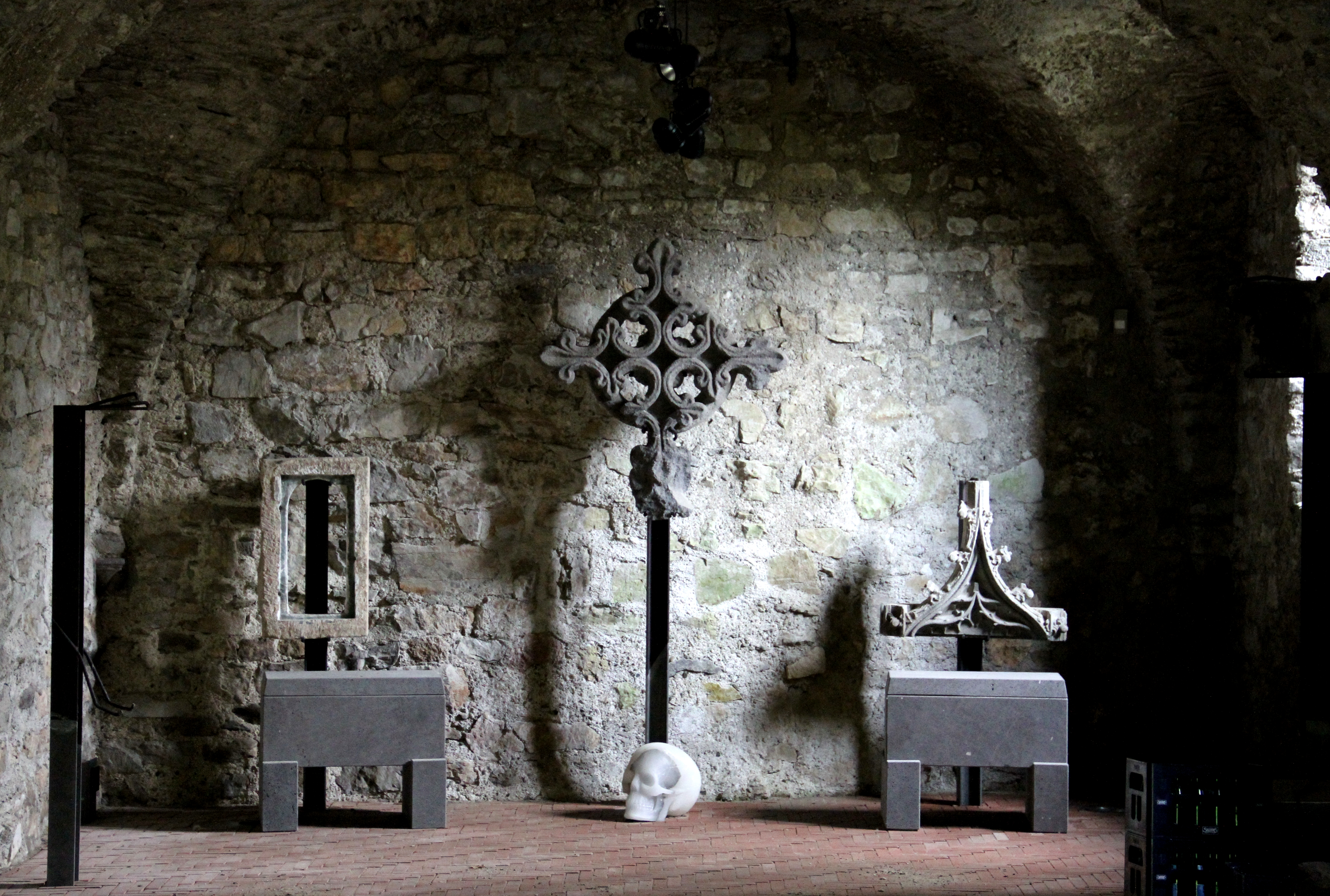 Alte Grabkreuze im Untergeschoss der St.-Michaels-Kapelle auf dem Ehemaligen Friedhof in Limburg an der Lahn.